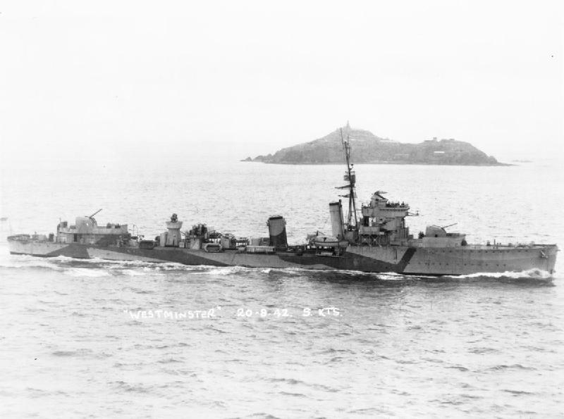 British destroyer HMS WESTMINSTER underway (after WAIR refit).